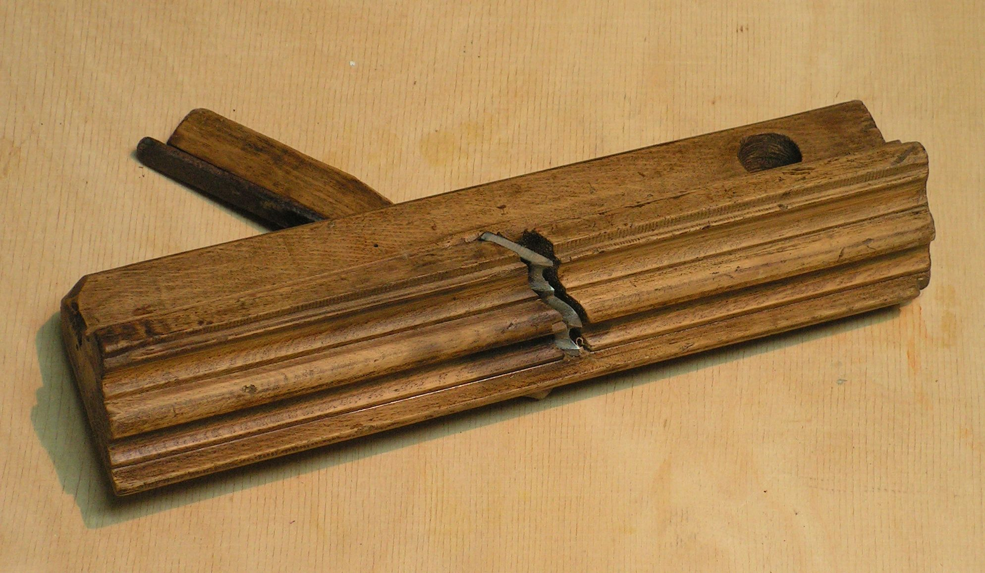 Strug profilowy.